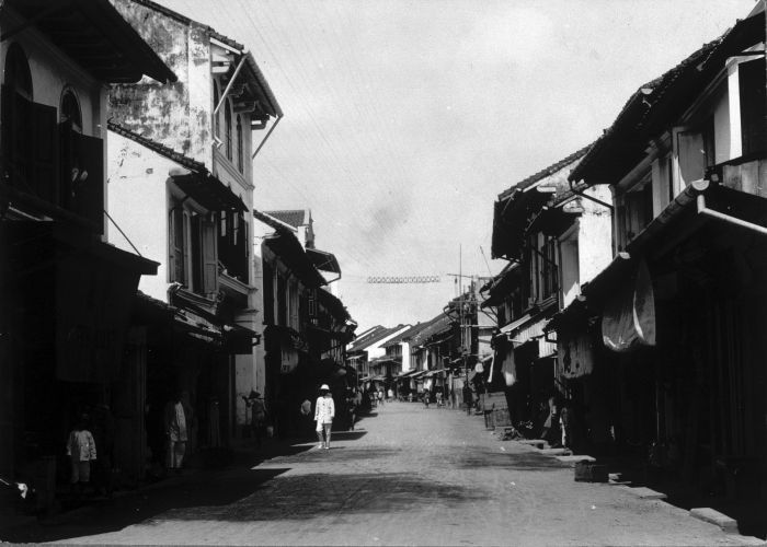 Foto. De Monstraat te Makassar.